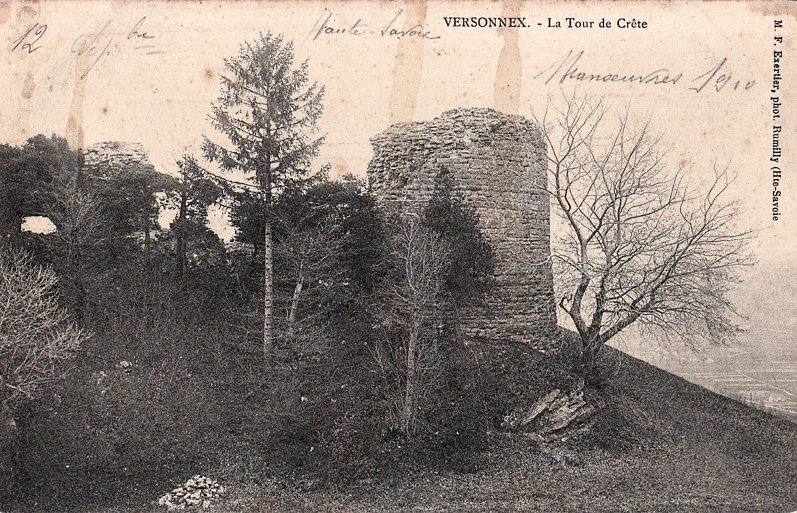 Ruines du château de Crête (XIV° siècle), Versonnex, Haute-Savoie (France). Carte postale, 1910